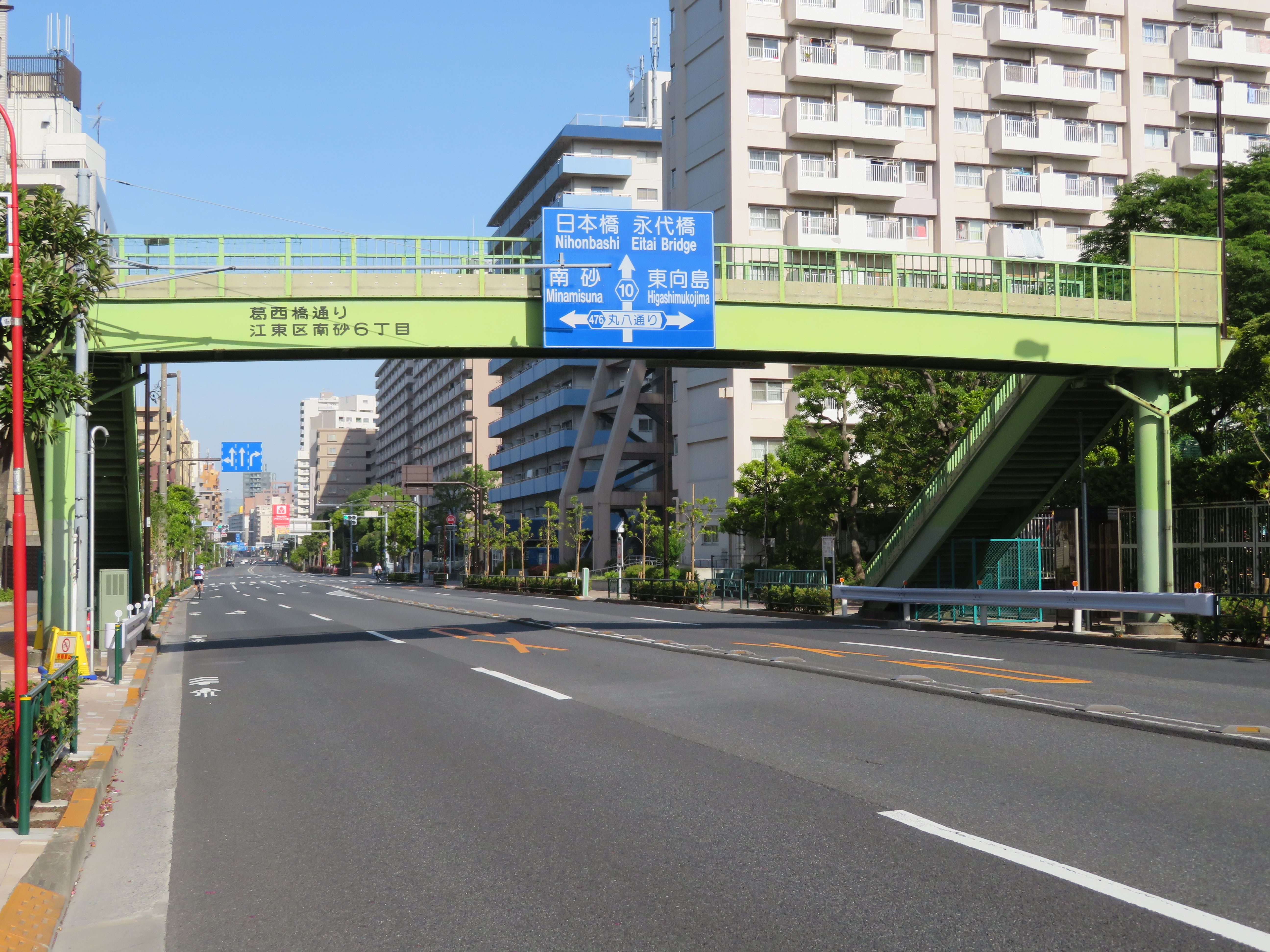 東京都道10号線（葛西橋通り）江東区南砂6丁目付近（日本橋方面を撮影） Canon PowerShot SX720 HS